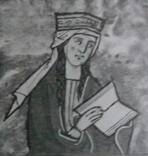 Žaltář Heřmana Durynského